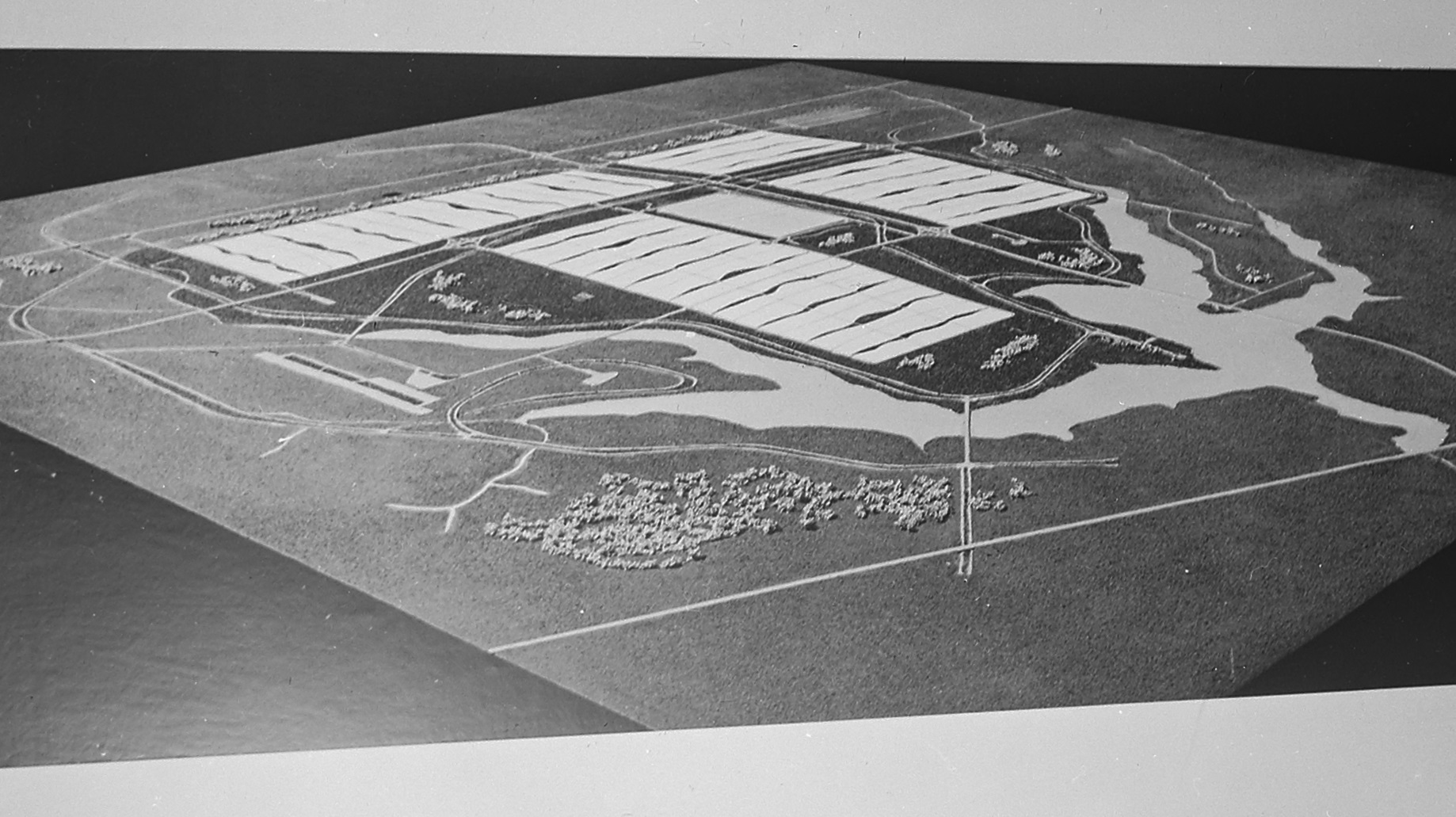 Imagem do Fundo Agência Nacional, do Arquivo Nacional